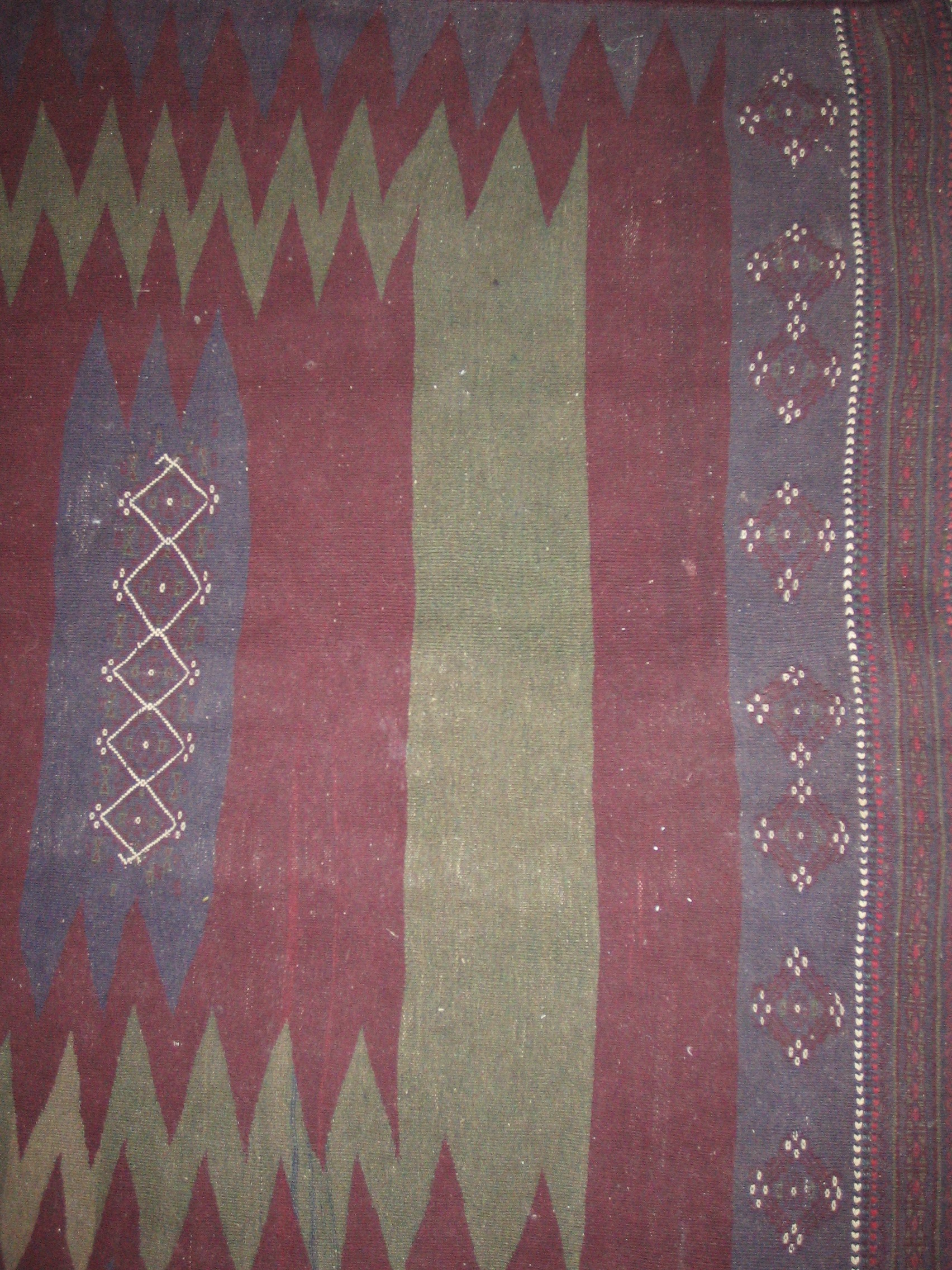 Detail from an Iranian kilim